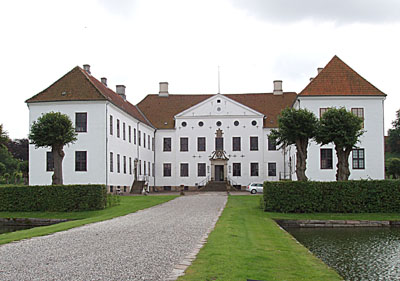 Clausholm Slot near Randers, Denmark